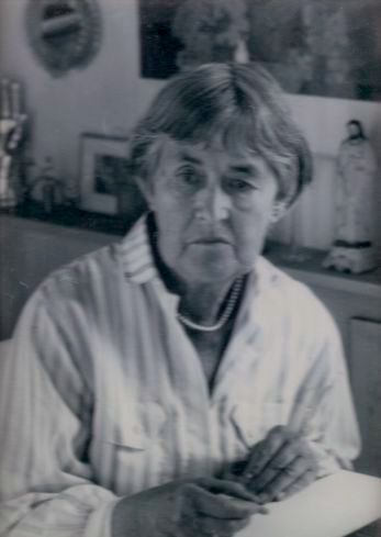 Das Foto stellt die Malerin Käthe Ricken dar.